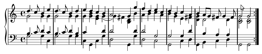 Premières mesures de la pièce anonyme La Bounette extraite du Mulling Book, n° 13.